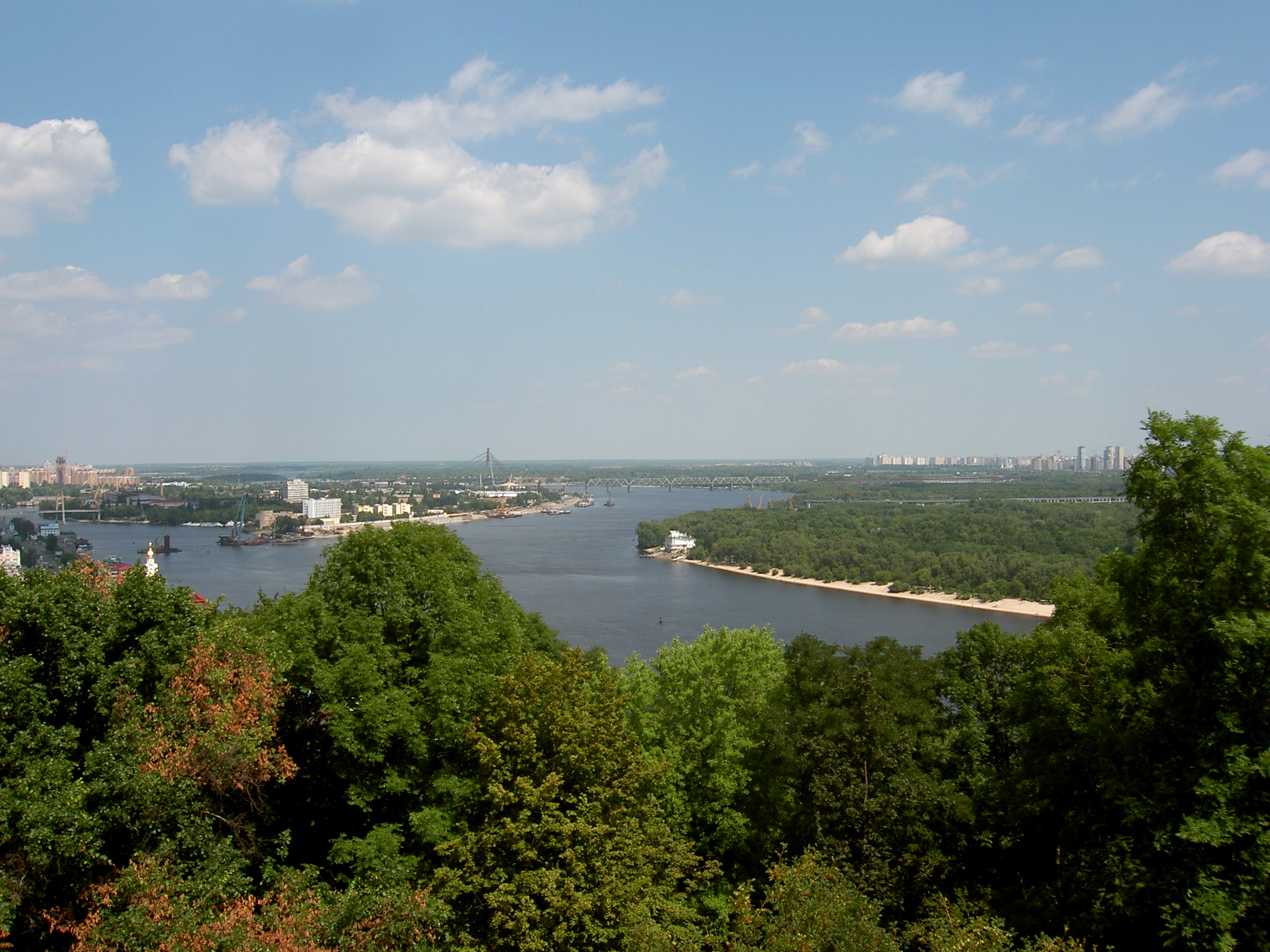 Dněpr v Kyjevě